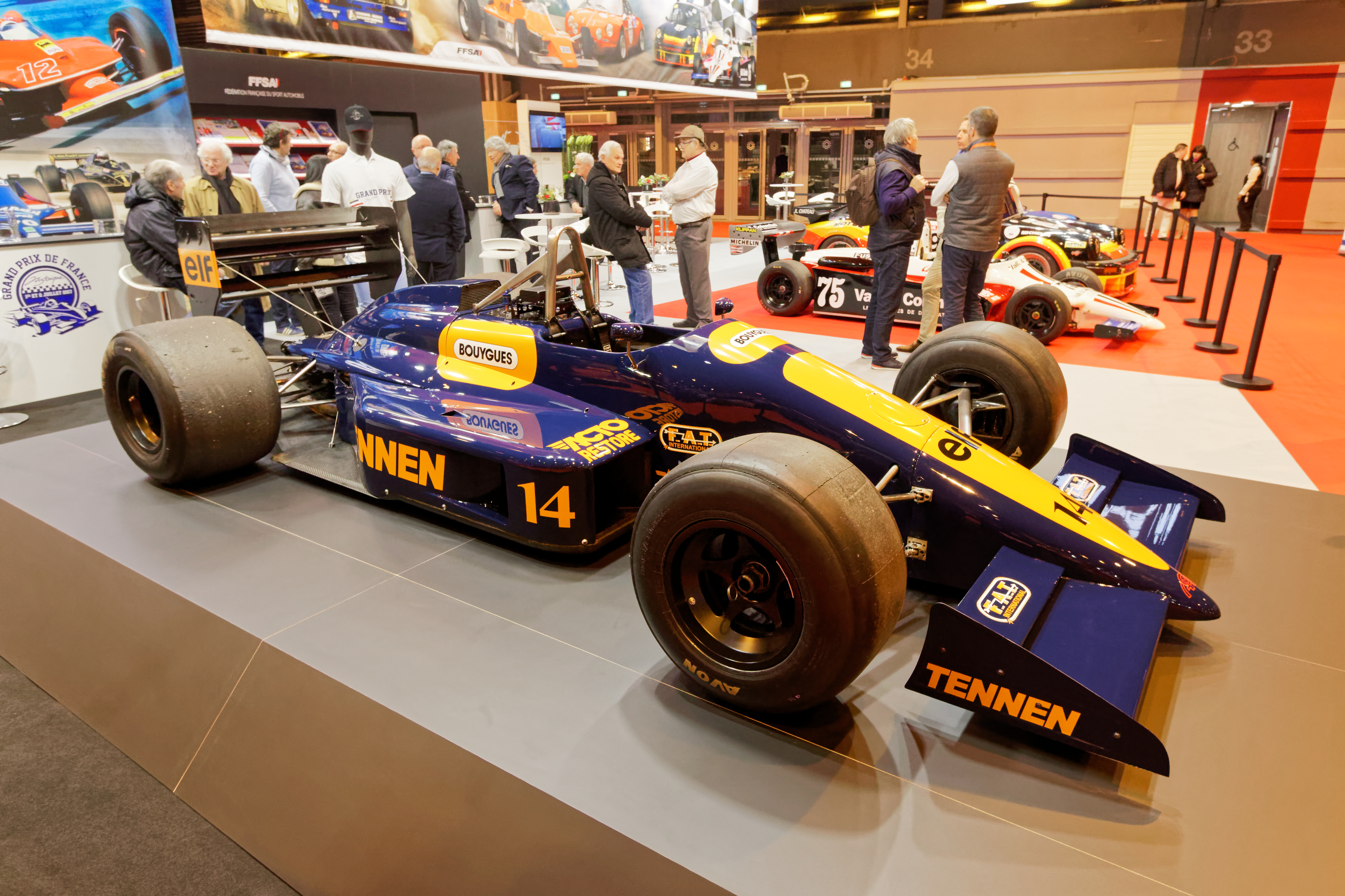 Un AGS JH23 de 1989 exposé lors du salon Rétromobile 2017.